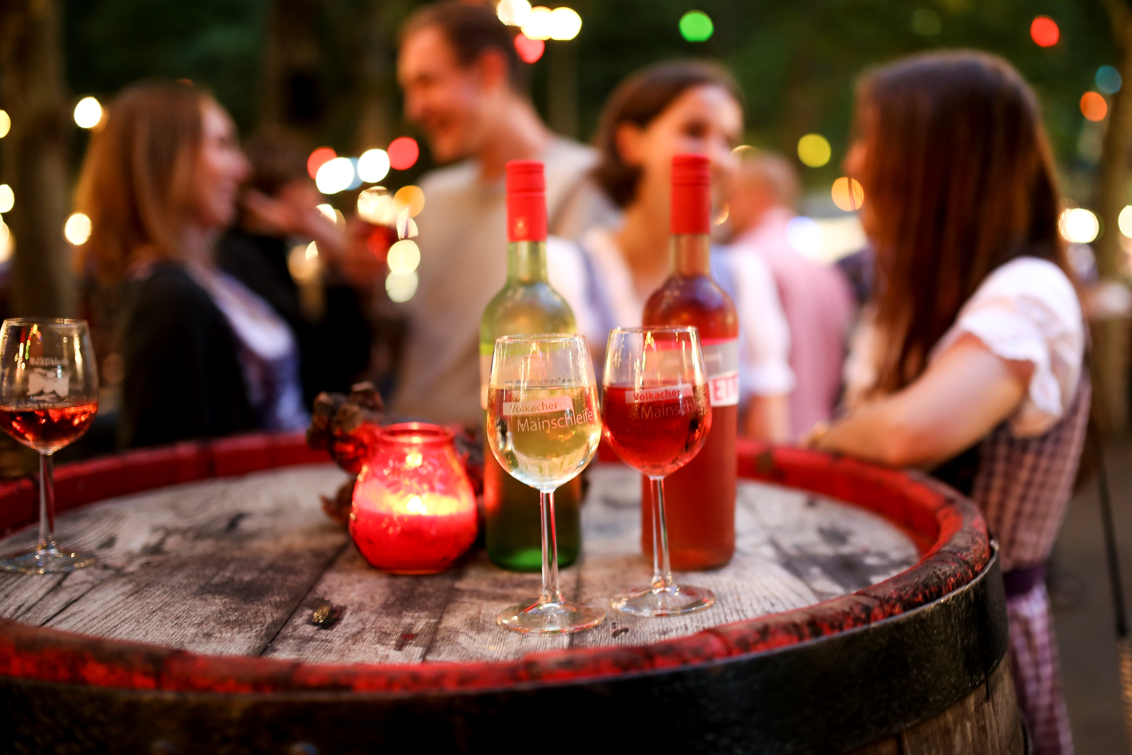 Weingenuss auf dem Festplatz in Volkach